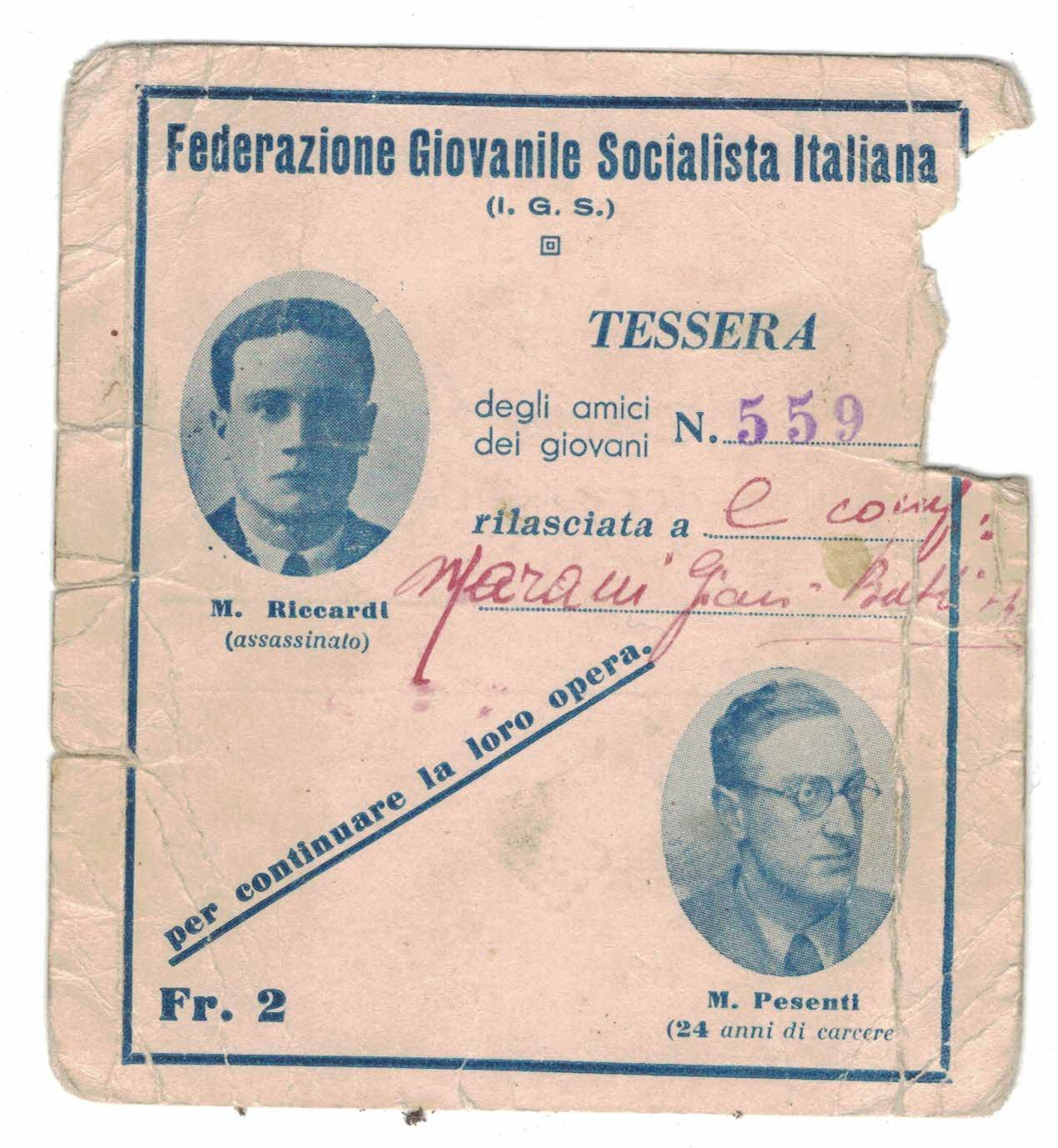 Tessera della FGSI durante la guerra civile spagnola